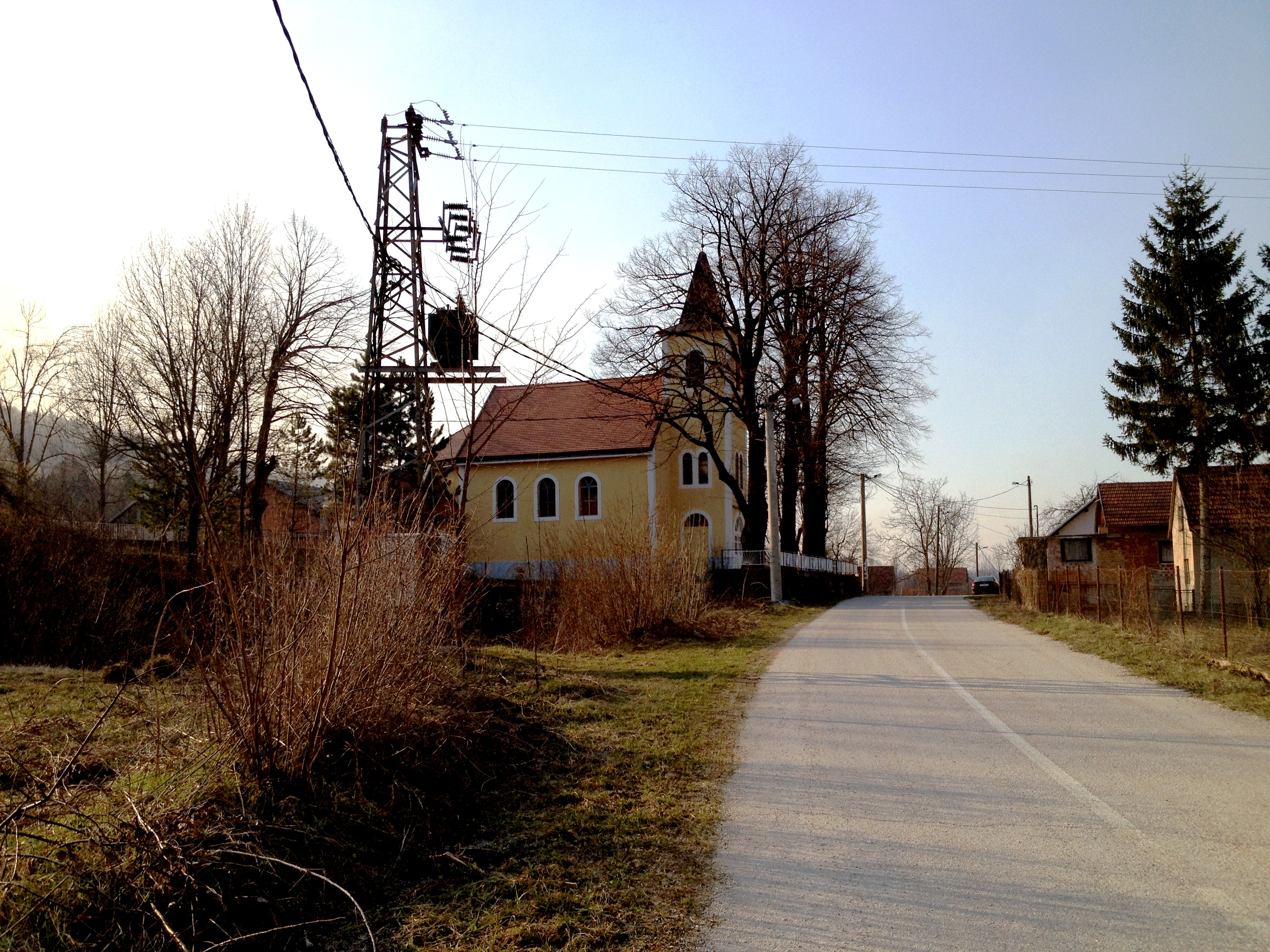 Veliki Skočaj